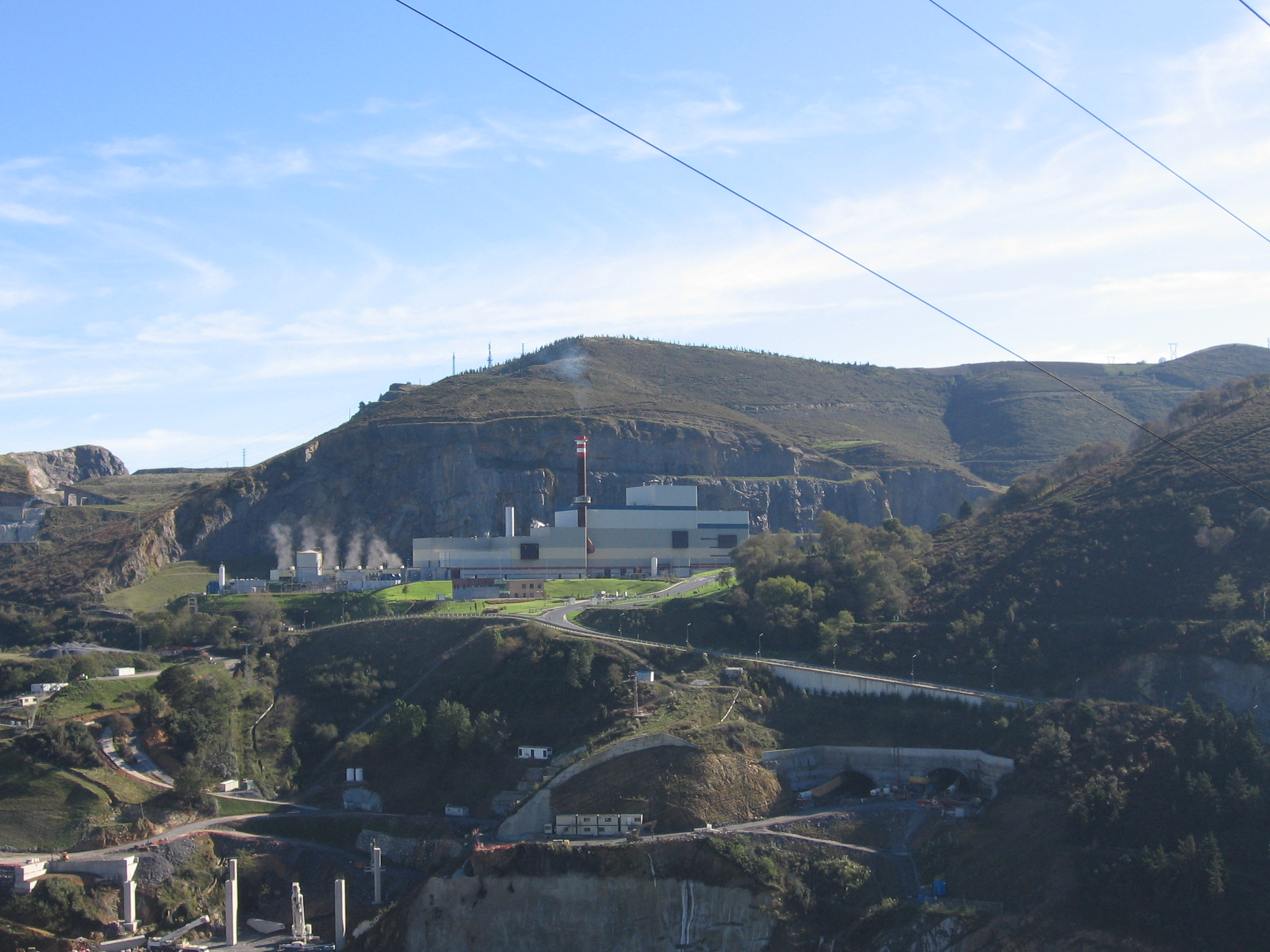 Incineradora Alonsotegi